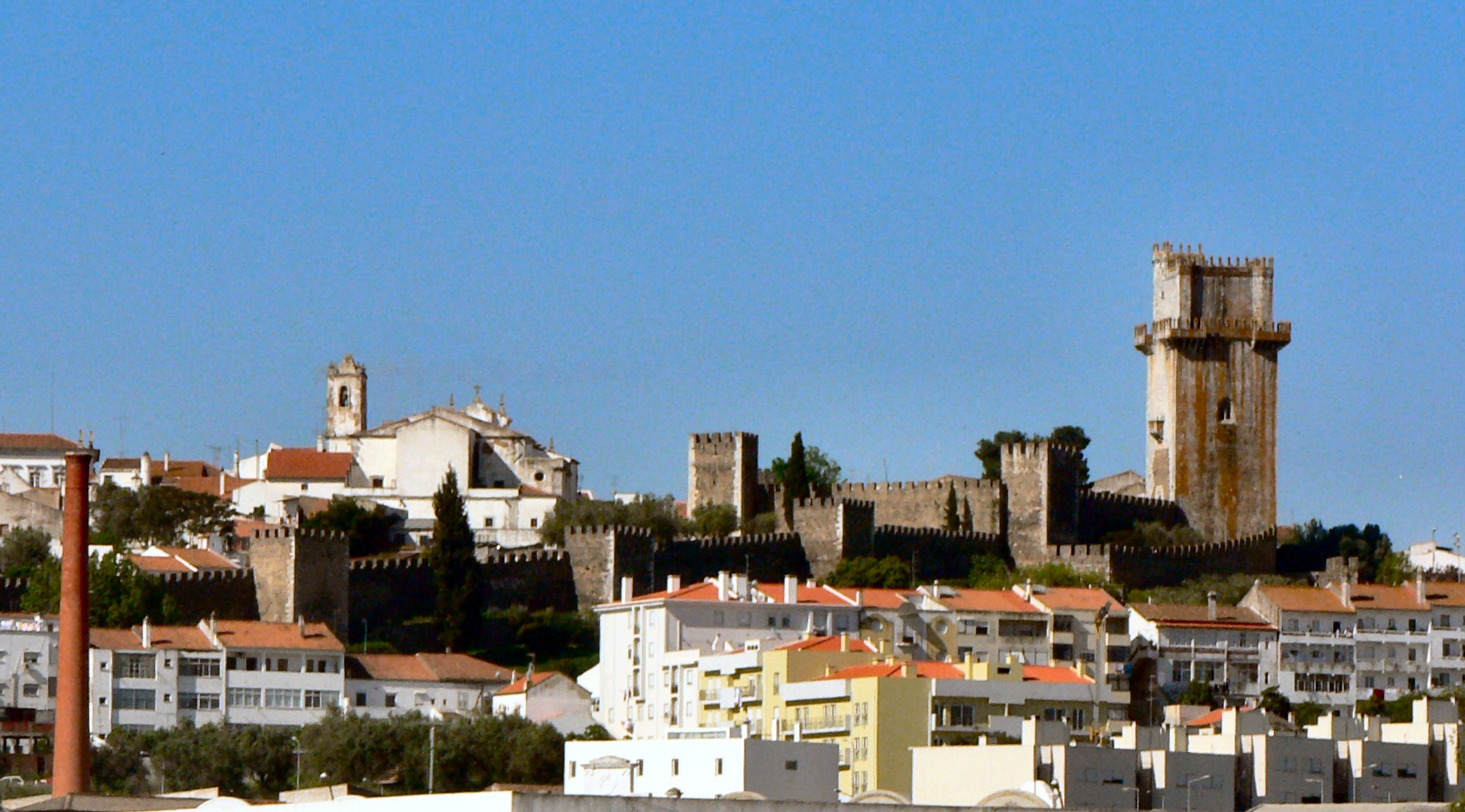 Castelo de Beja